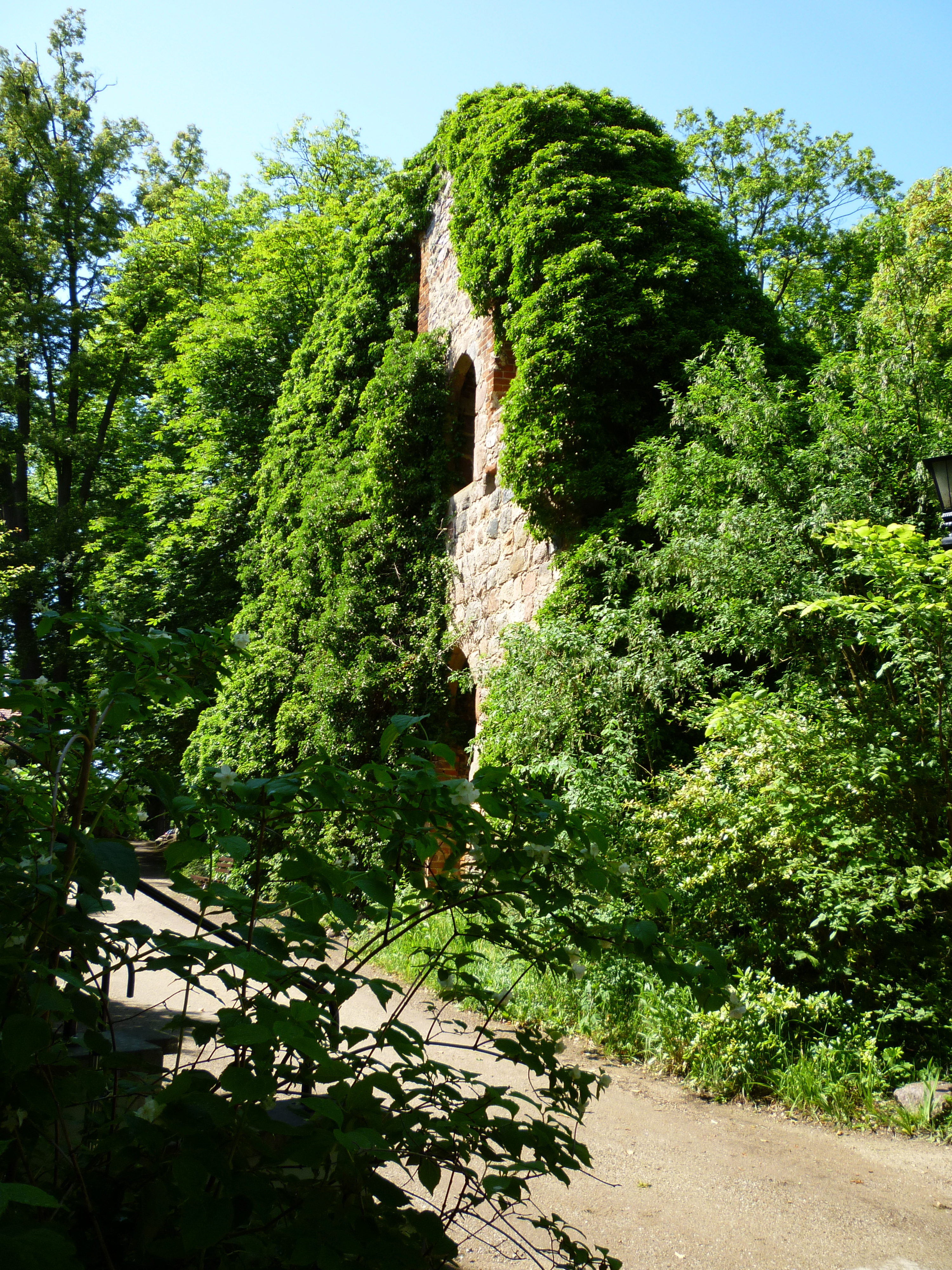 Südseite der Ruinen des Klosters Lindow